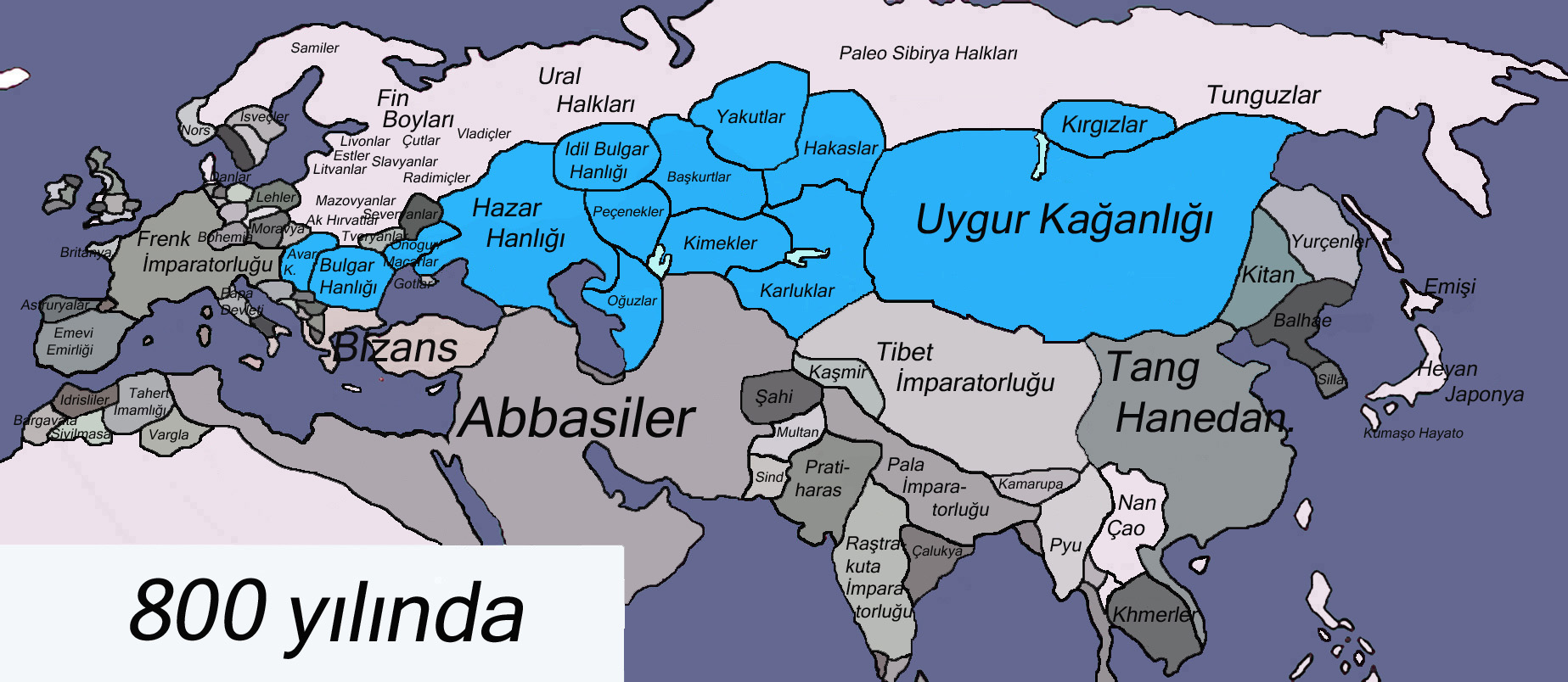 Kaynak: Haritanın büyük bir kısmı Thomas Lessmann'nin izini ile kendi ürettiği Tarihi dünya haritaları'ndan alınmıştır. Ayrıca Jean-Paul Roux'un Türklerin Tarihi (ISBN 975-997-091-0) adlı kitabındaki tariflerine göre ve Büyük Tarih Atlası (Arkın Kitabevi ISBN 975-402-012-4) ile bazı düzeltmeler ve ilaveler yapılmıştır.